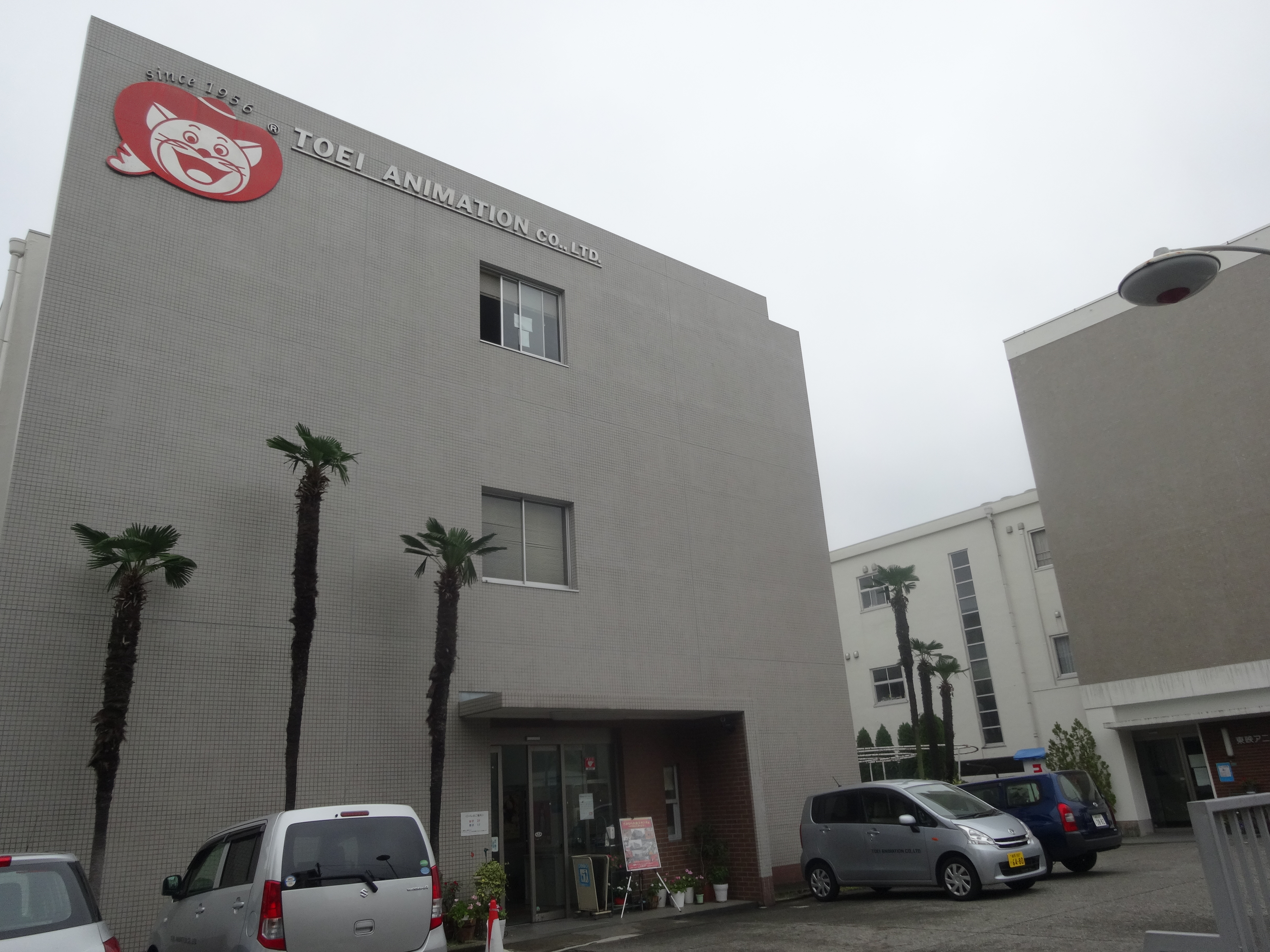 東映アニメーション 大泉スタジオ（初代、1957年 - 2015年）。東京都練馬区東大泉に所在。